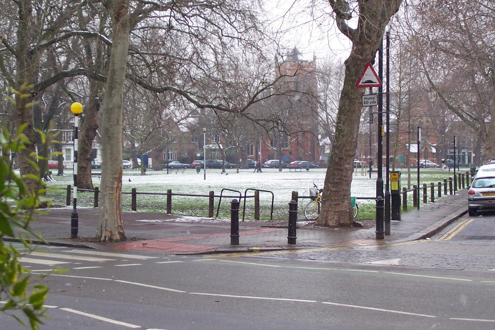 Parsons Green Park in winter 2004